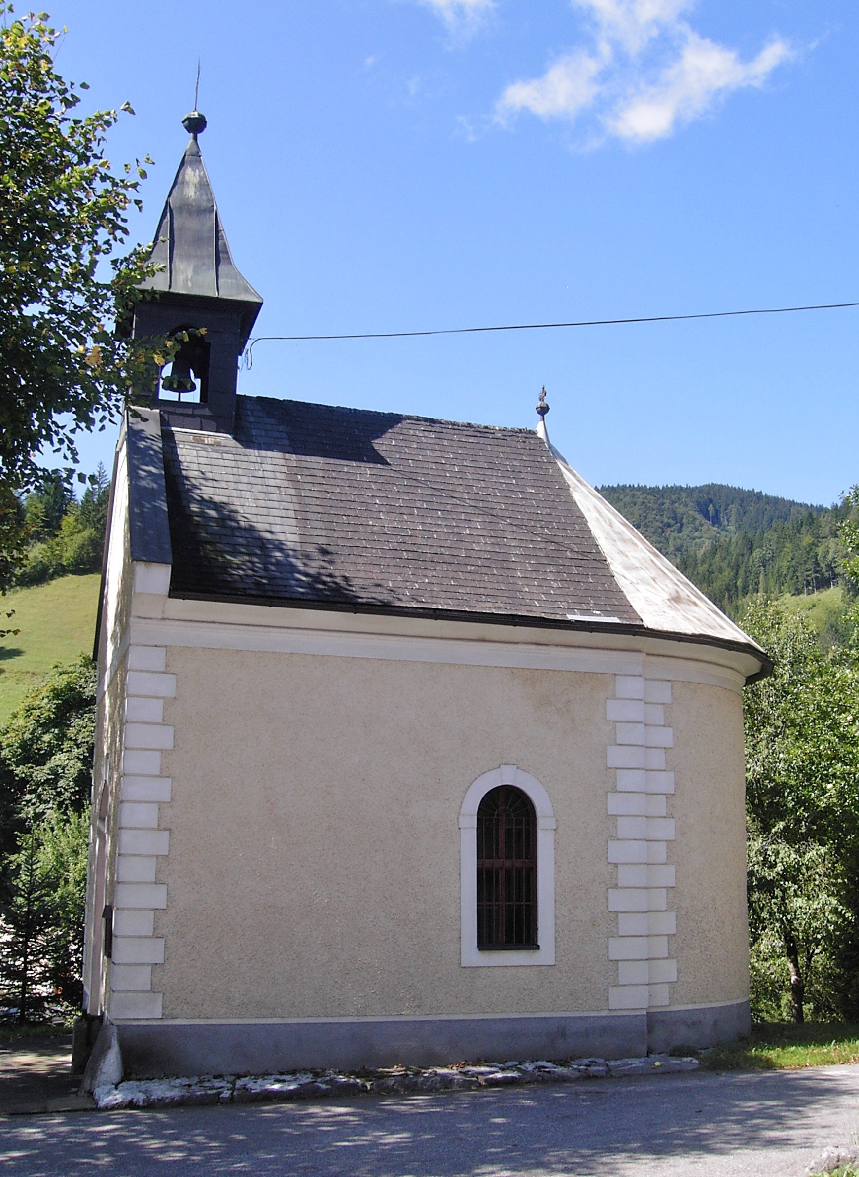 Gaflenz Schürhagelsche Hauskapelle Neudorf